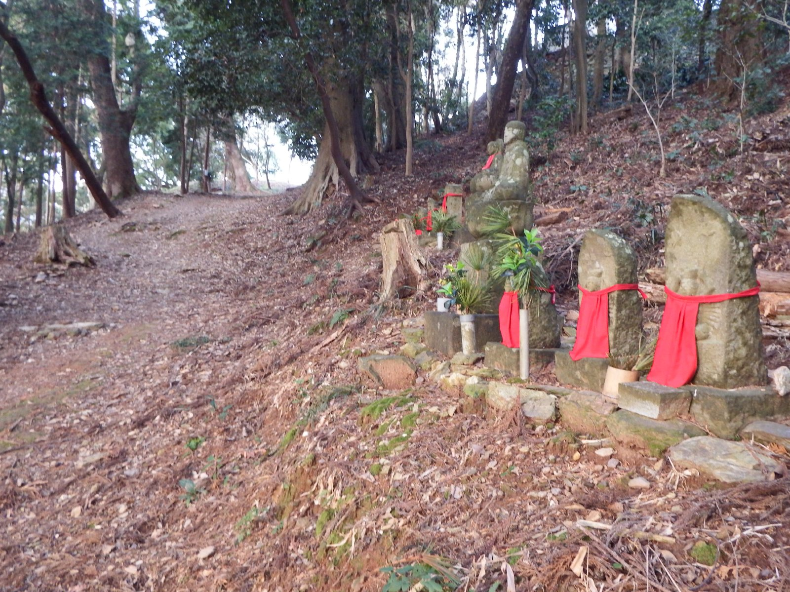 阿波遍路道 恩山寺道